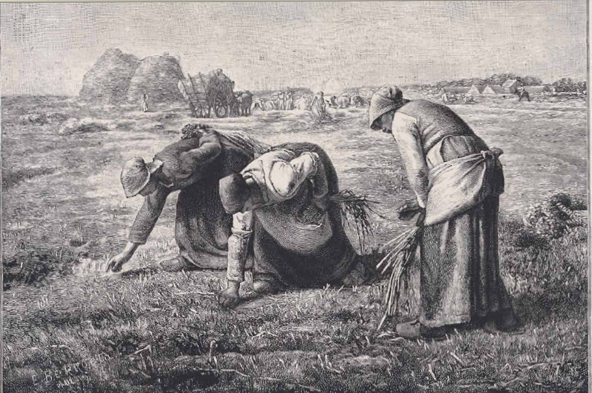 Grabado en madera de Elisa Berroeta, reproducción de pintura de Jean-François Millet . Firmada "E. Berroeta París" y presentada en el Salón de la Escuela de Bellas Artes en Santiago de Chile en 1906